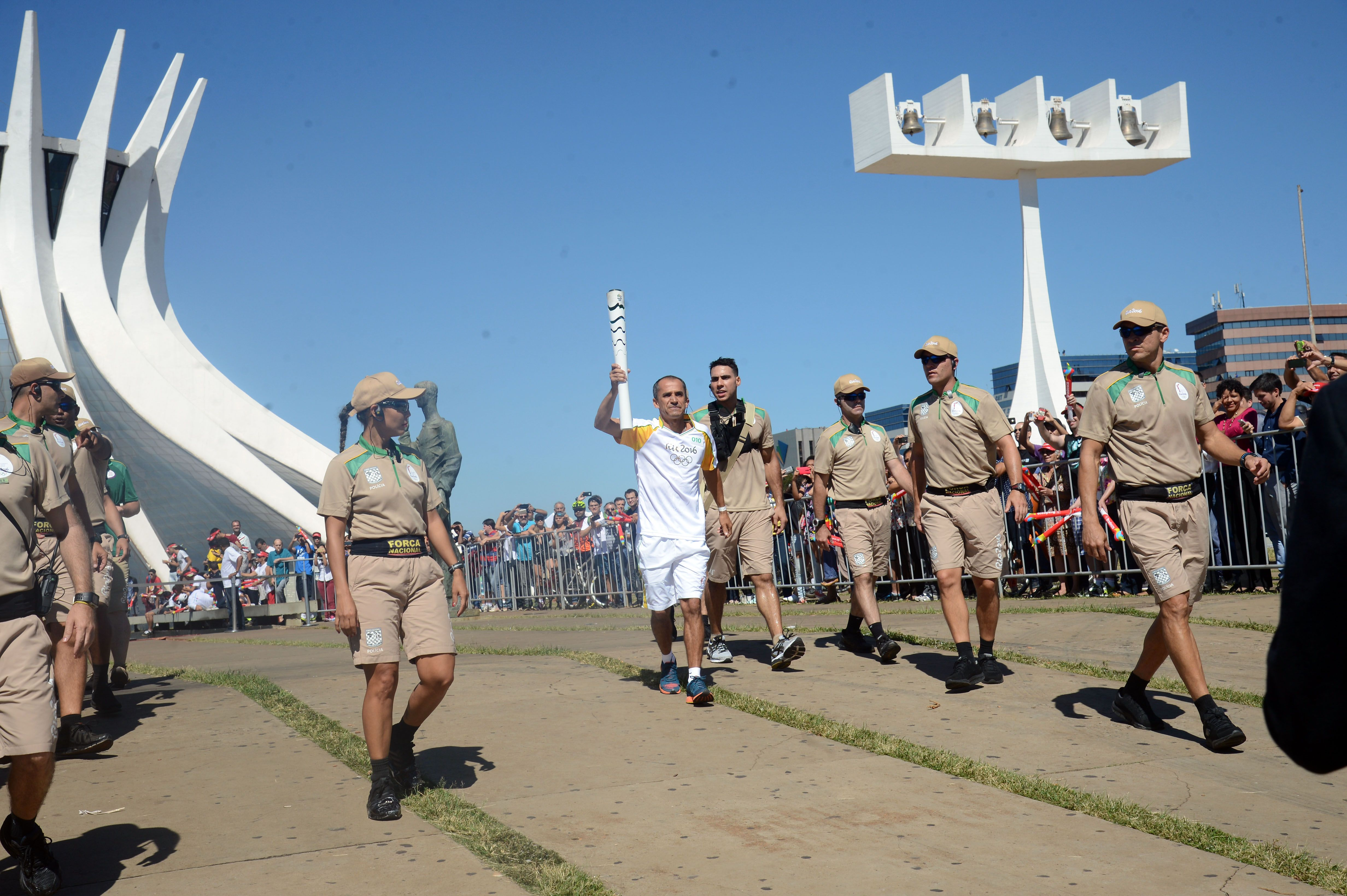 Brasília - O ex-maratonista Vanderlei Cordeiro de Lima conduz a Tocha Olímpica na Catedral de Brasília